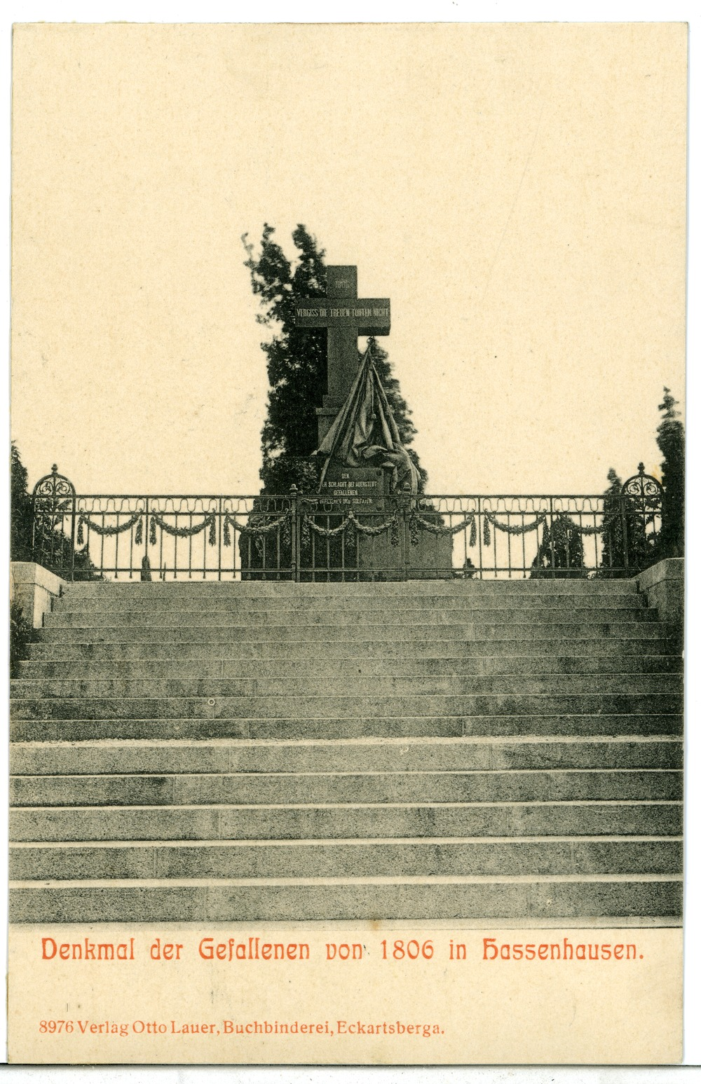 Hassenhausen; Denkmal der Gefallenen von 1806 This postcard is from publisher Brück & Sohn in Meißen ( postcard has a unique number 08976 and is available in a higher resolution at the publisher. This images was uploaded in a cooperation project between Wikipedians and the publisher.